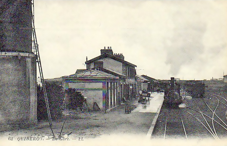 La gare de Quiberon avec son chateau d'eau, vers 1900.